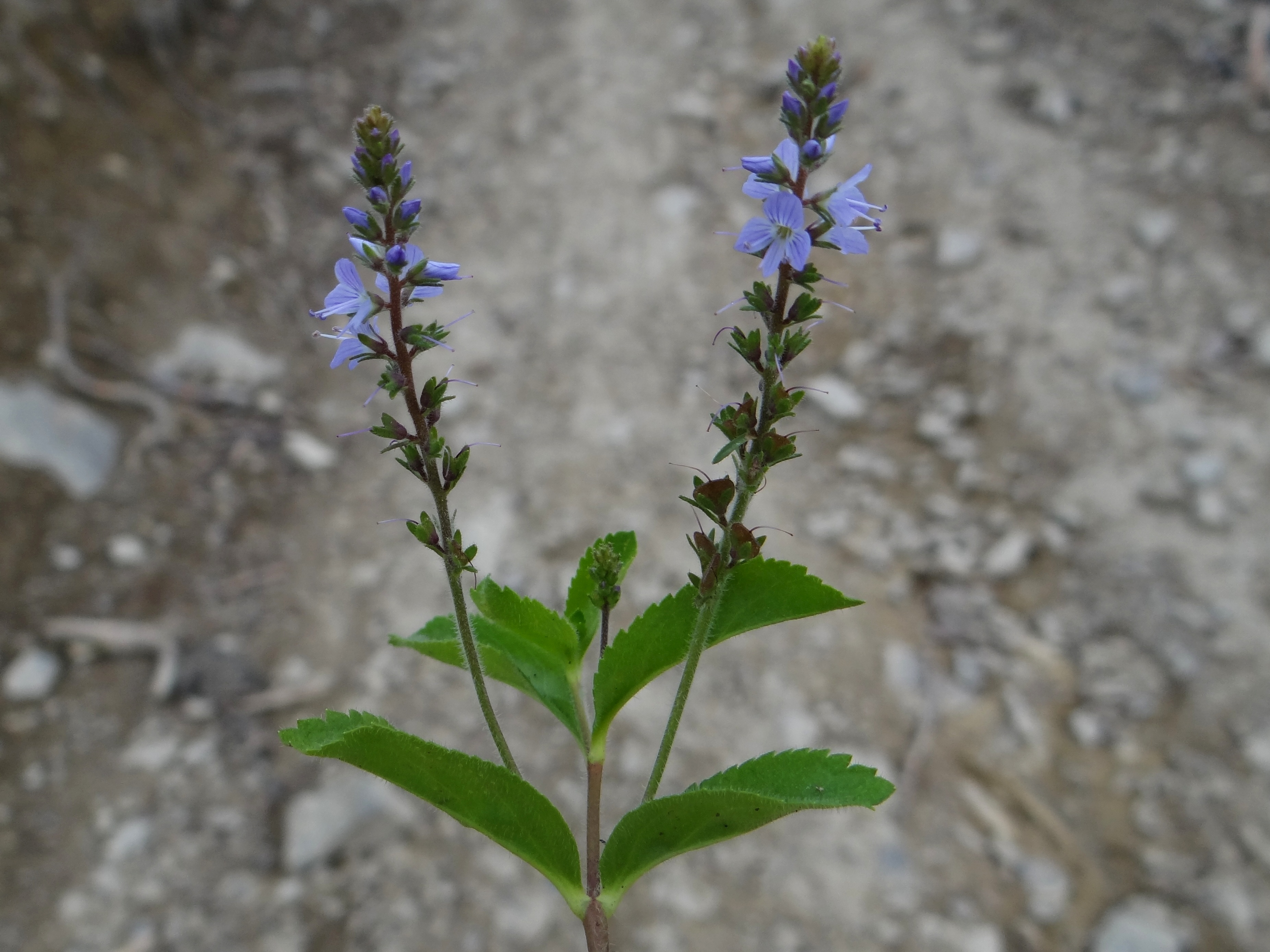 Veronica officinalis (location: Poland, Beskid Wyspowy, Lubogoszcz)